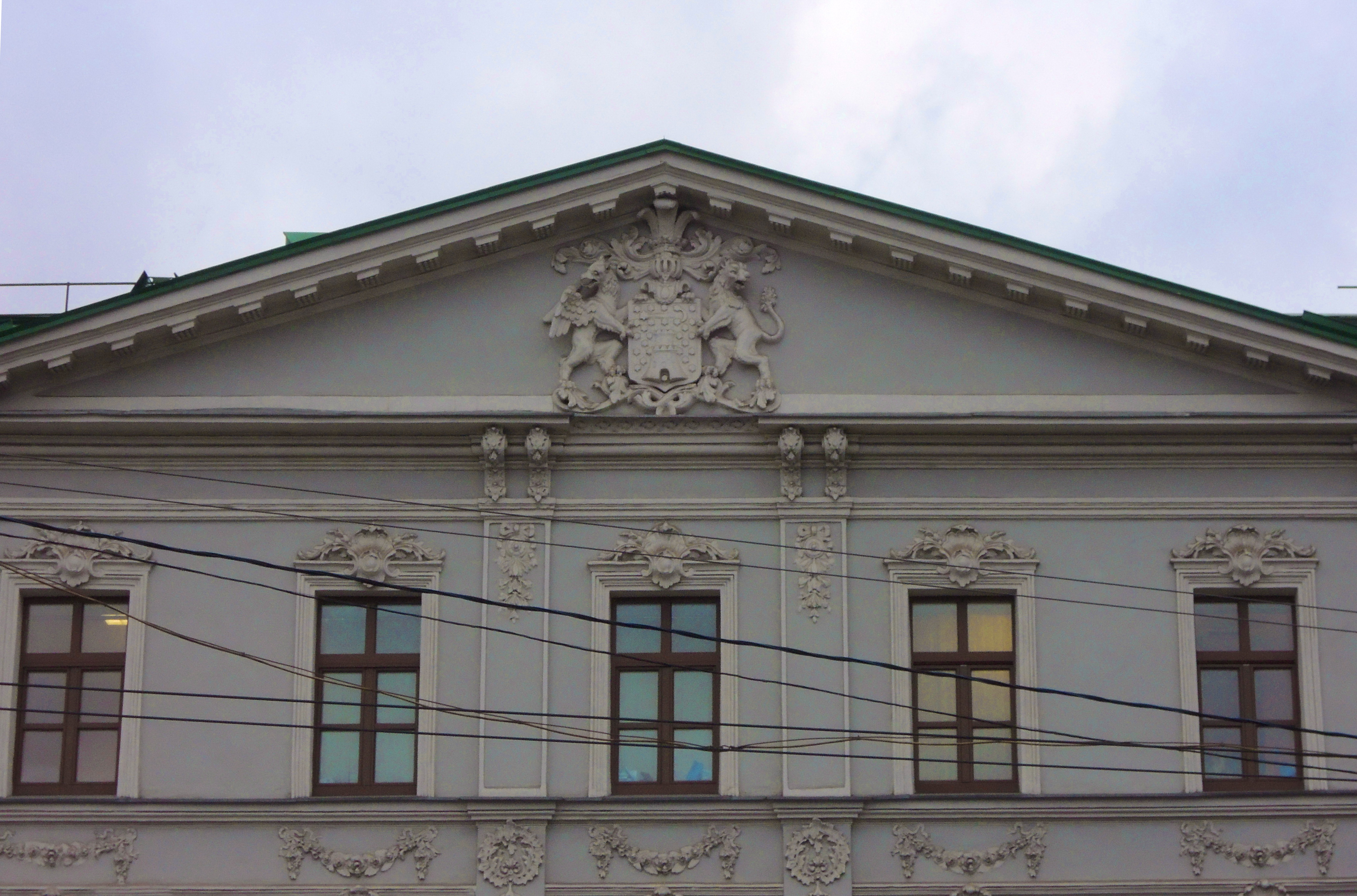 Усадьба Шаховского — Краузе — Осиповских